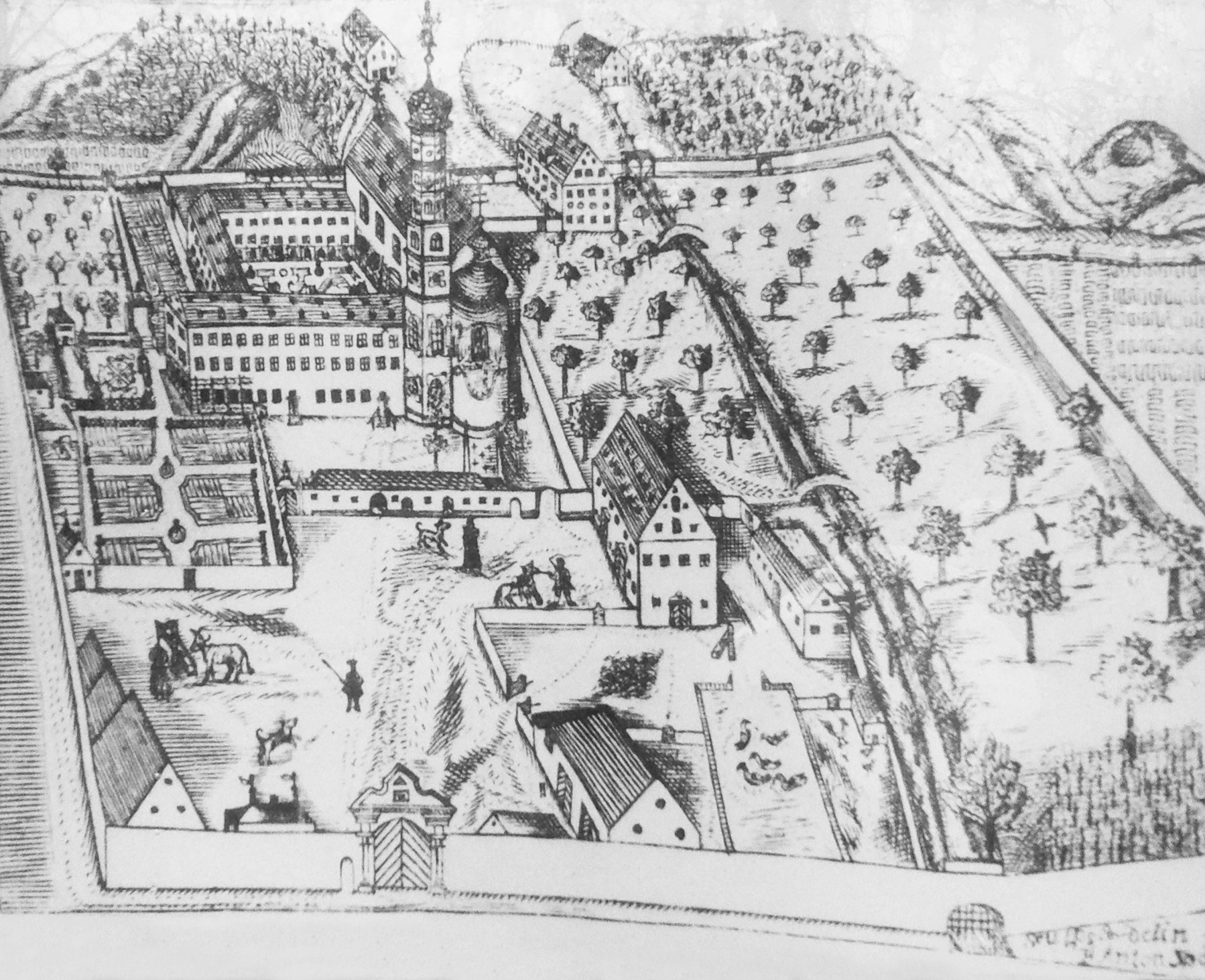 Kloster Maihingen, Stich von Anton Späth um 1720